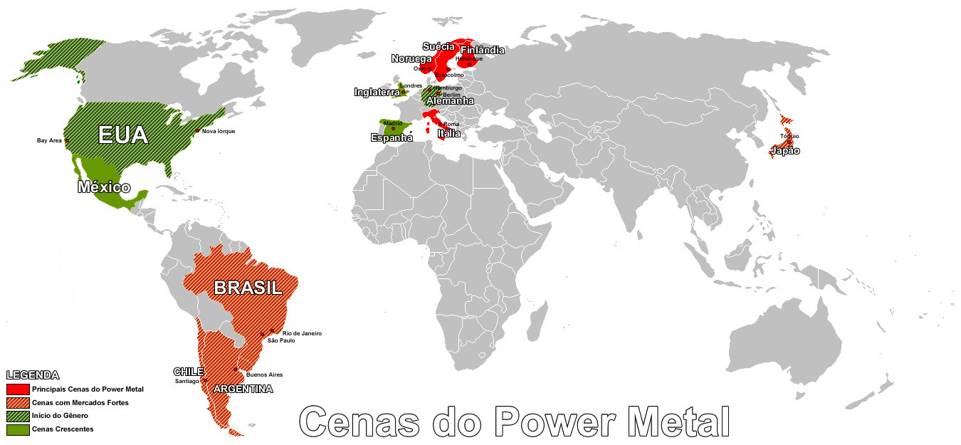 Mapa da Pupularização Global do Power Metal [1]